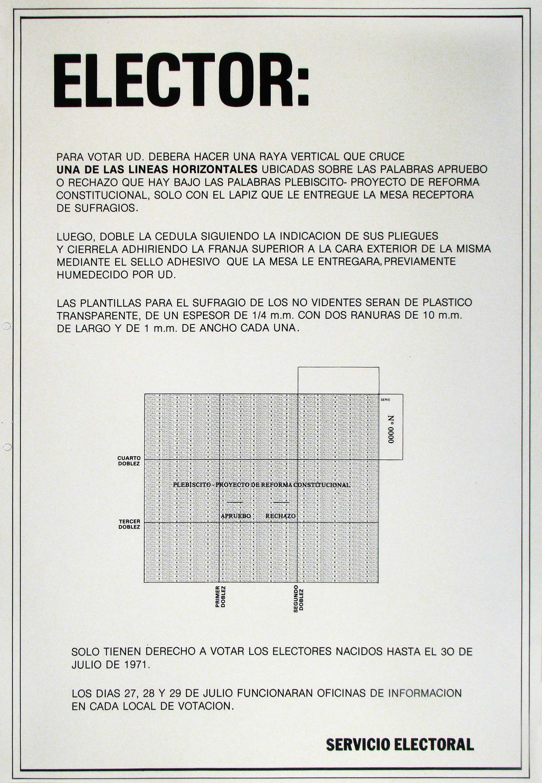 Afiche que presenta un facsímil del voto utilizado en el plebiscito de reformas constitucionales realizado en Chile en 1989, e instrucciones sobre la votación.